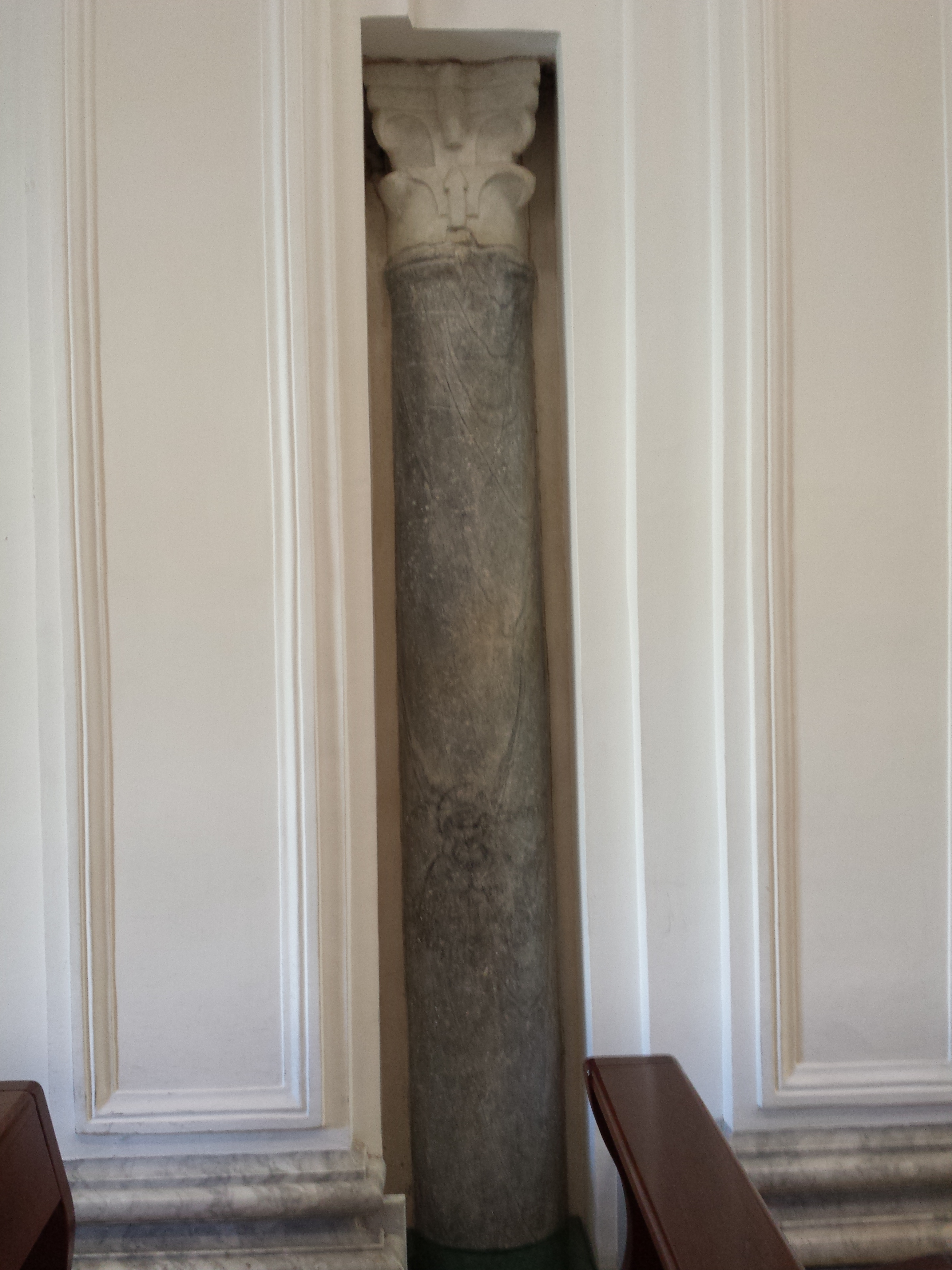 Colonna romanica della chiesa dell'abbazia di San Prisco, oggi cattedrale di Nocera Inferiore